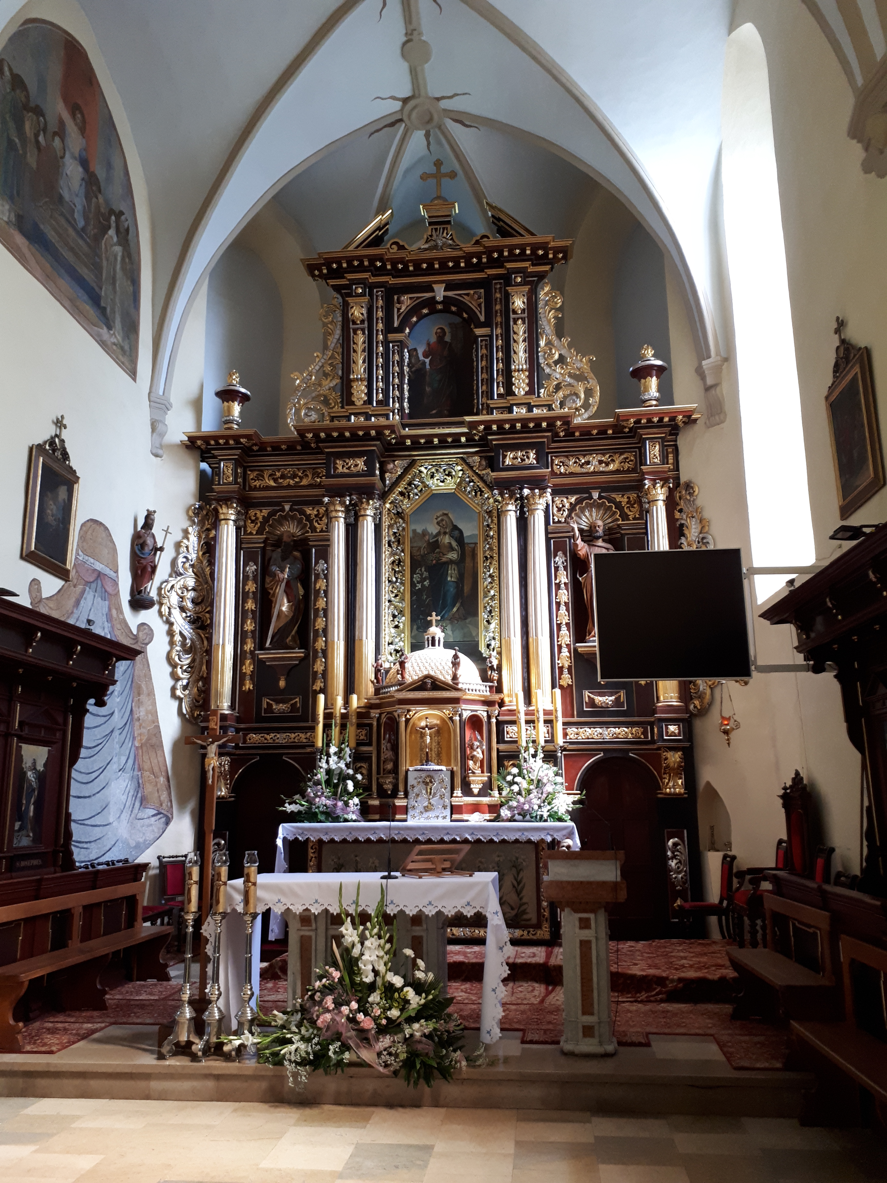 Ołtarz główny w kościele św. Elżbiety Węgierskiej w Starym Sączu.